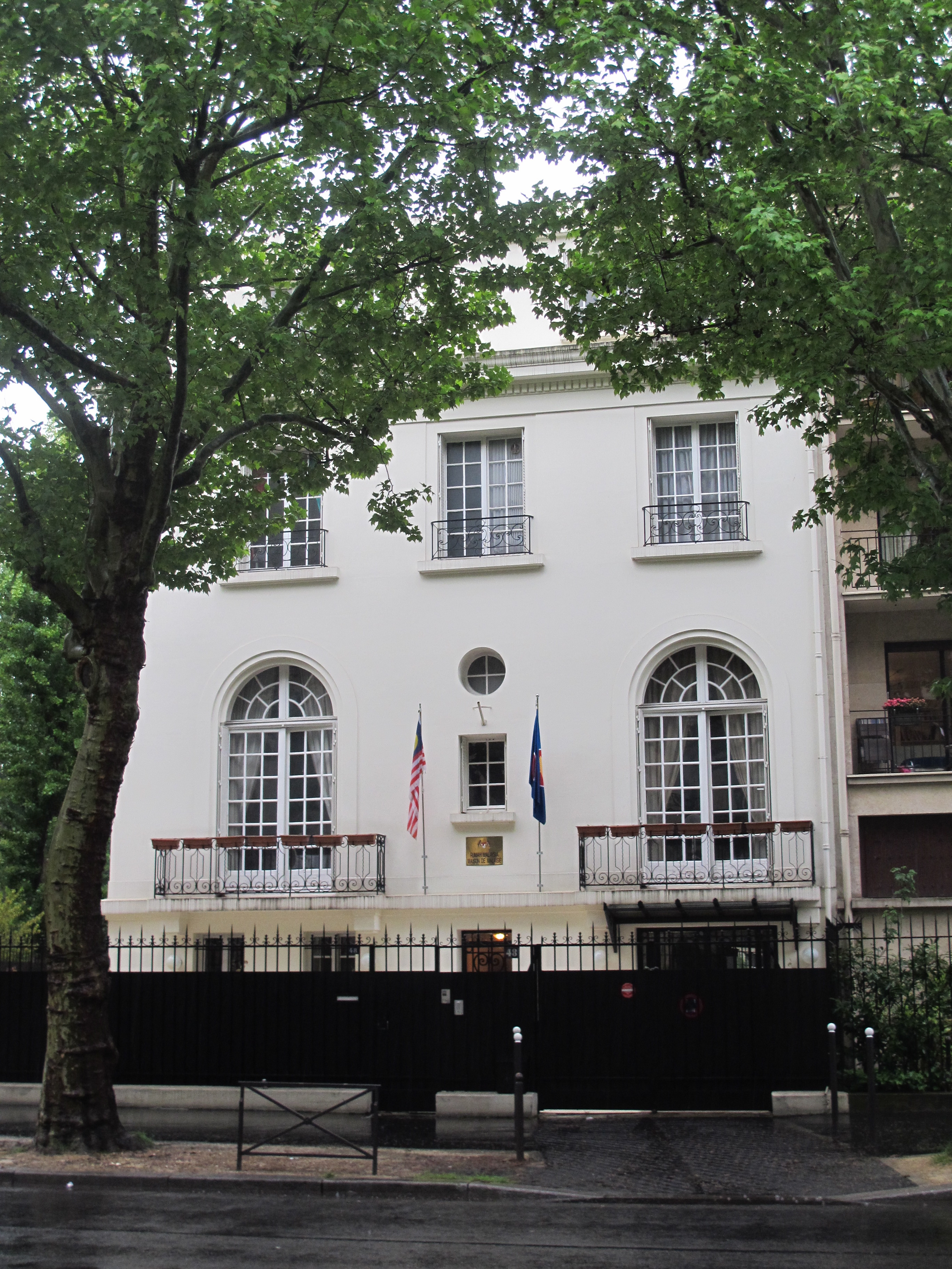 Maison de la Malaisie (résidence de l'ambassadeur), dans le 16e arrondissement de Paris, 48 boulevard Suchet (l'ambassade se trouve dans le même arrondissement, 2 bis rue Benouville).